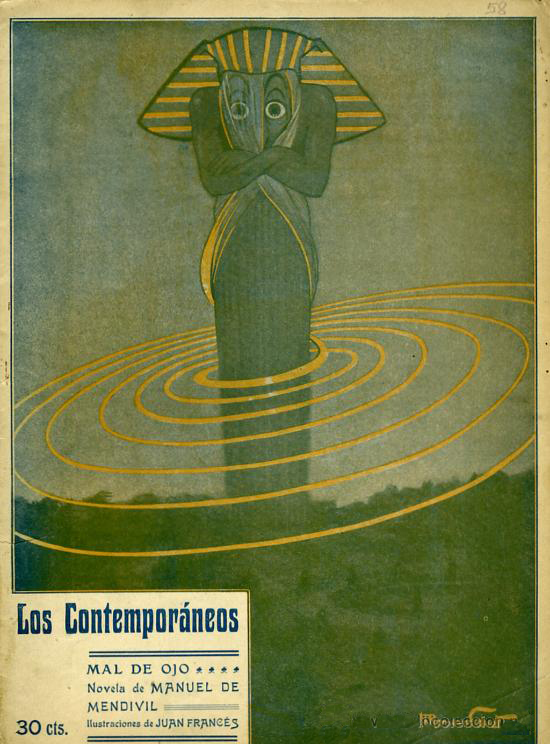 Portada de Mal de ojo.